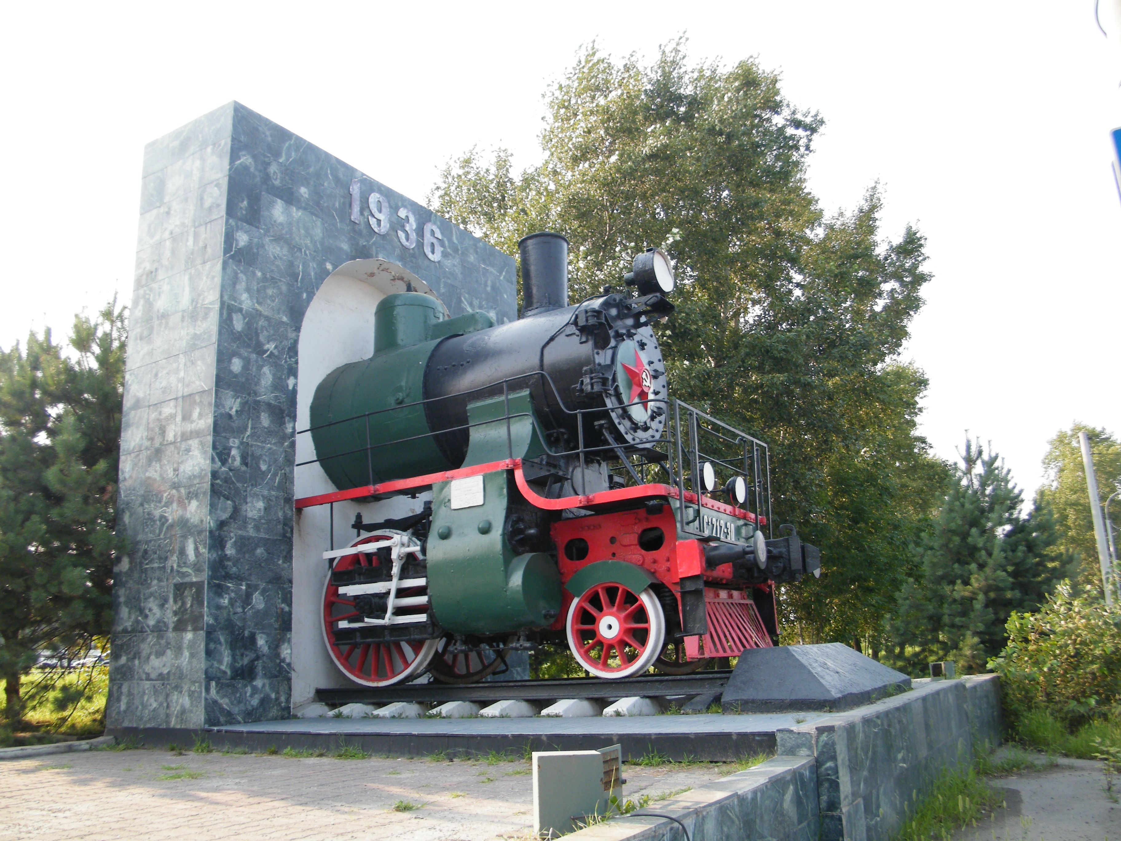 Паровоз Су 212-30 Хабаровск